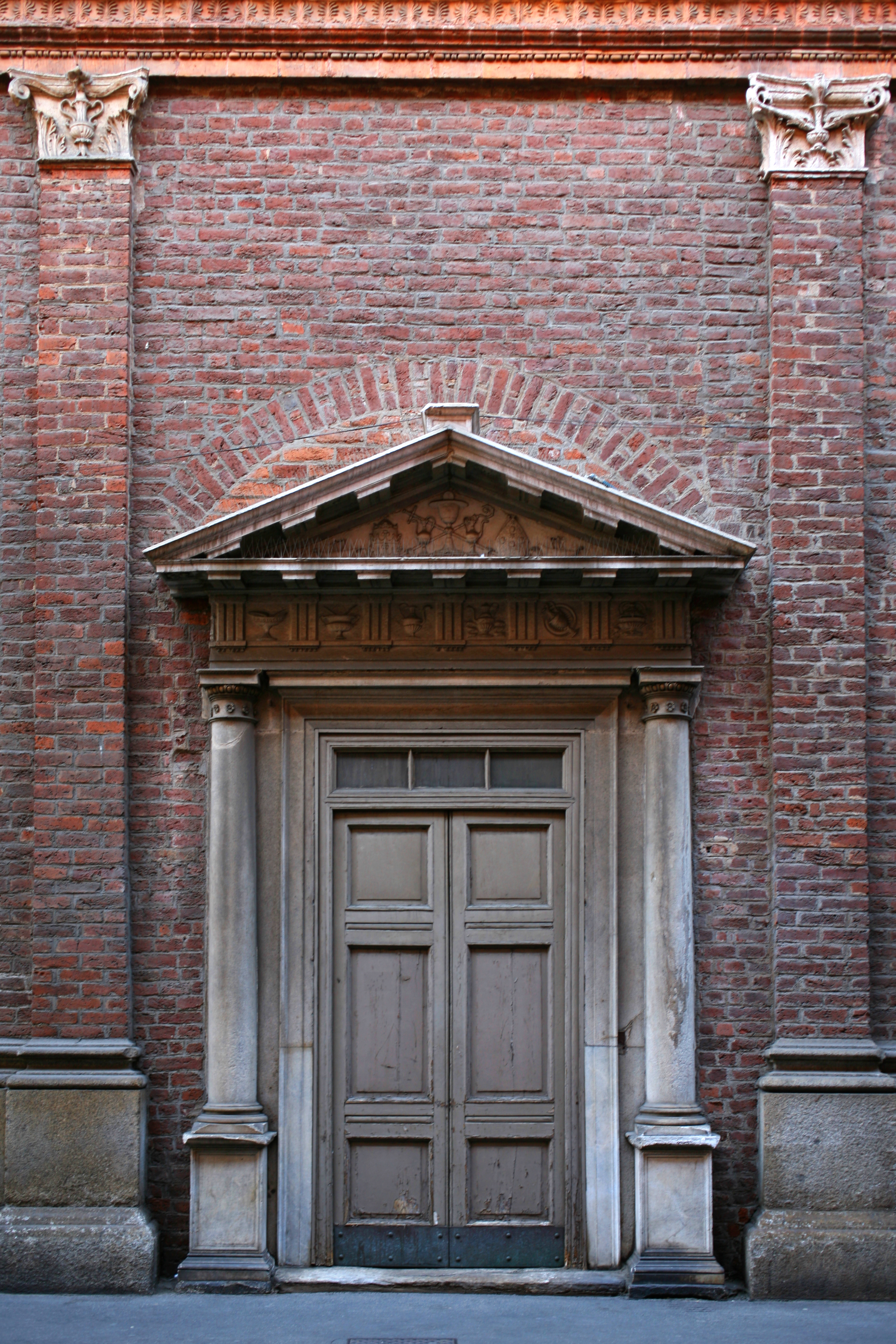 La chiesa di San Satiro a Milano nelle sue viste esterne e interne